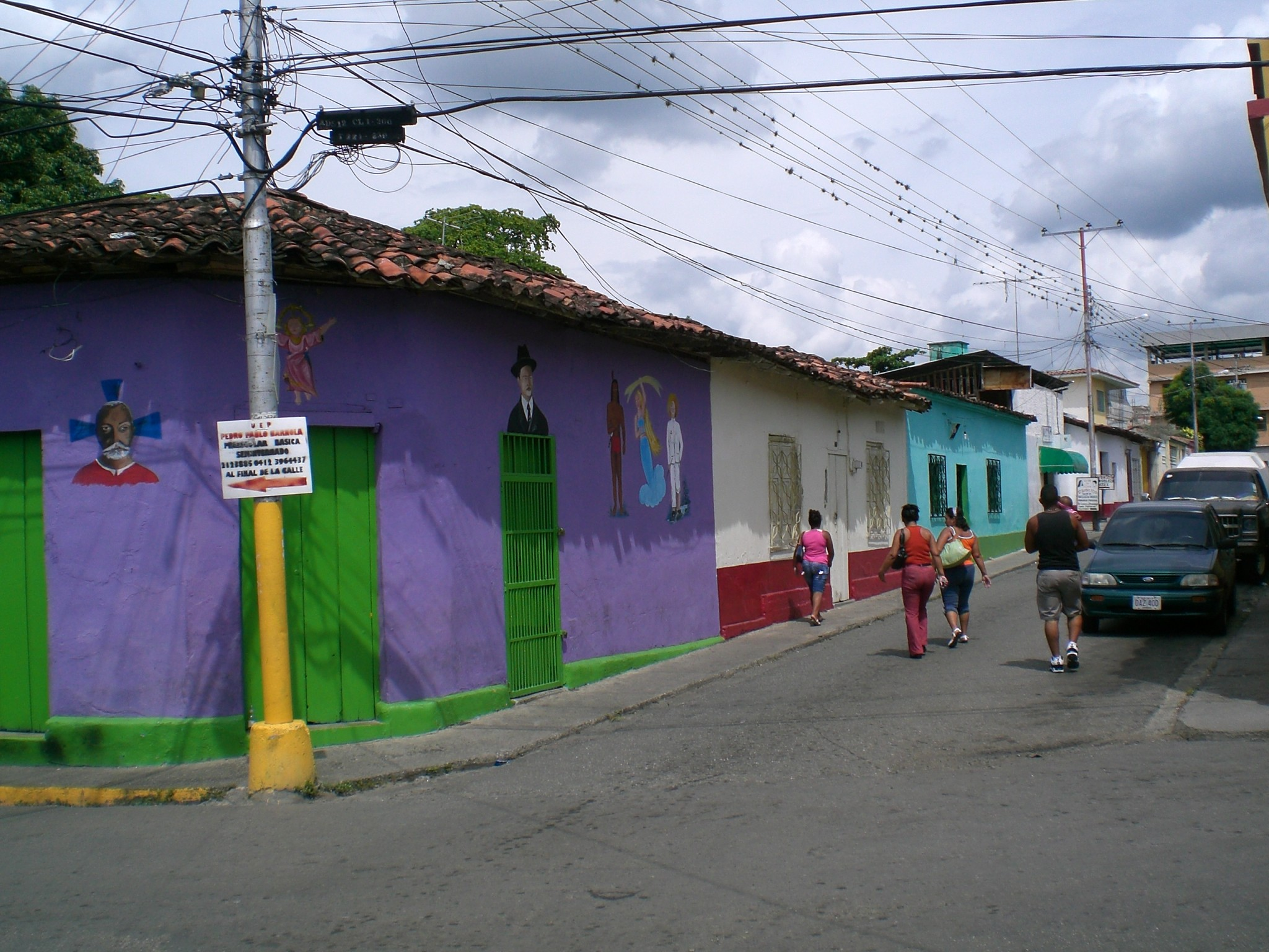 Street of Cúa, Venezuela